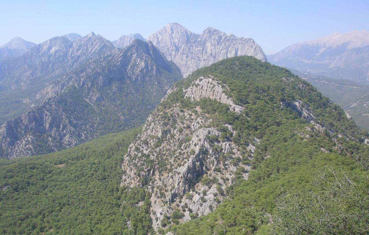 Antalya, Tahtalı Dağı